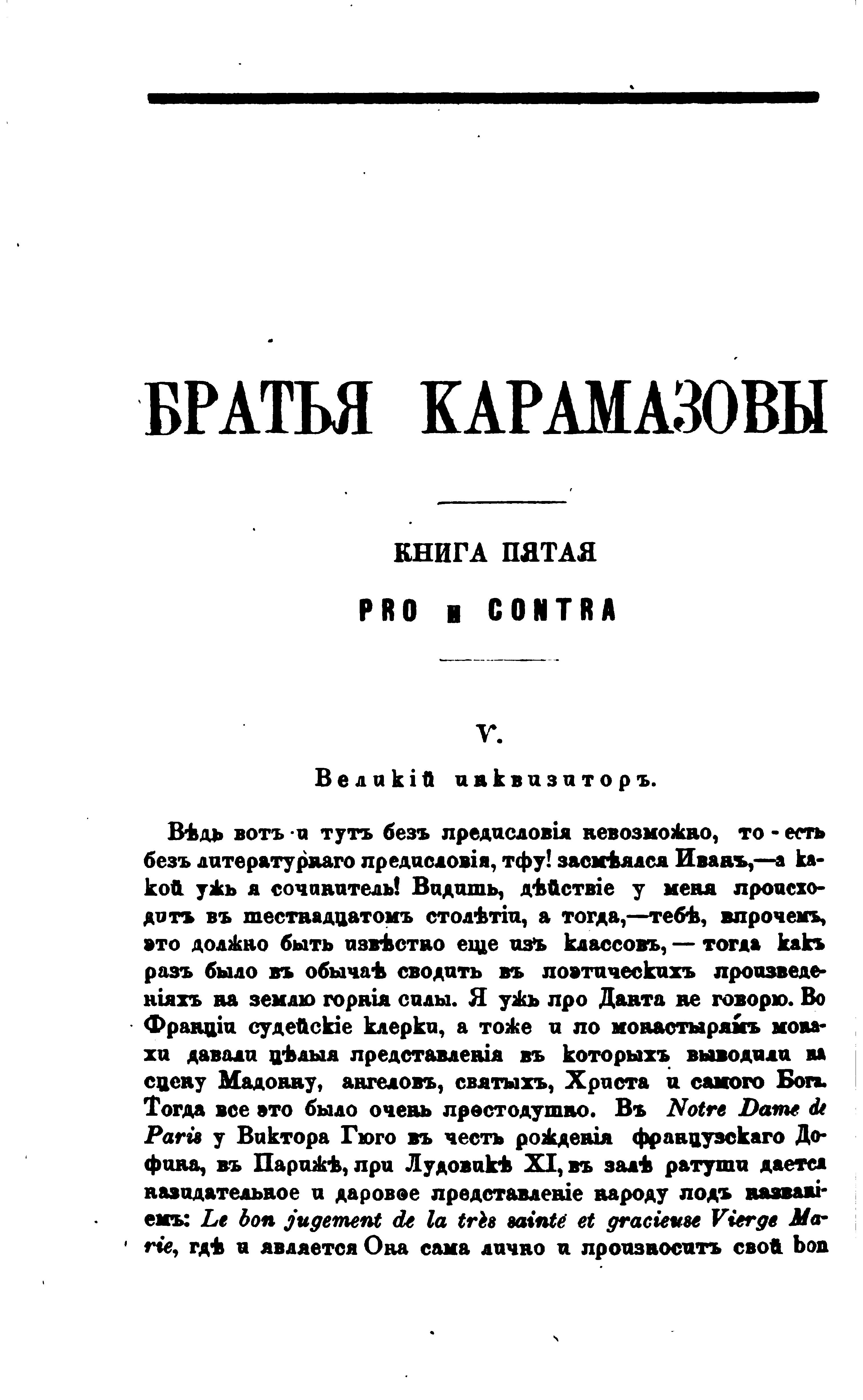 "Великий инквизитор", глава пятая из пятой книги второй части романа Ф.М.Достоевского "Братья Карамазовы"